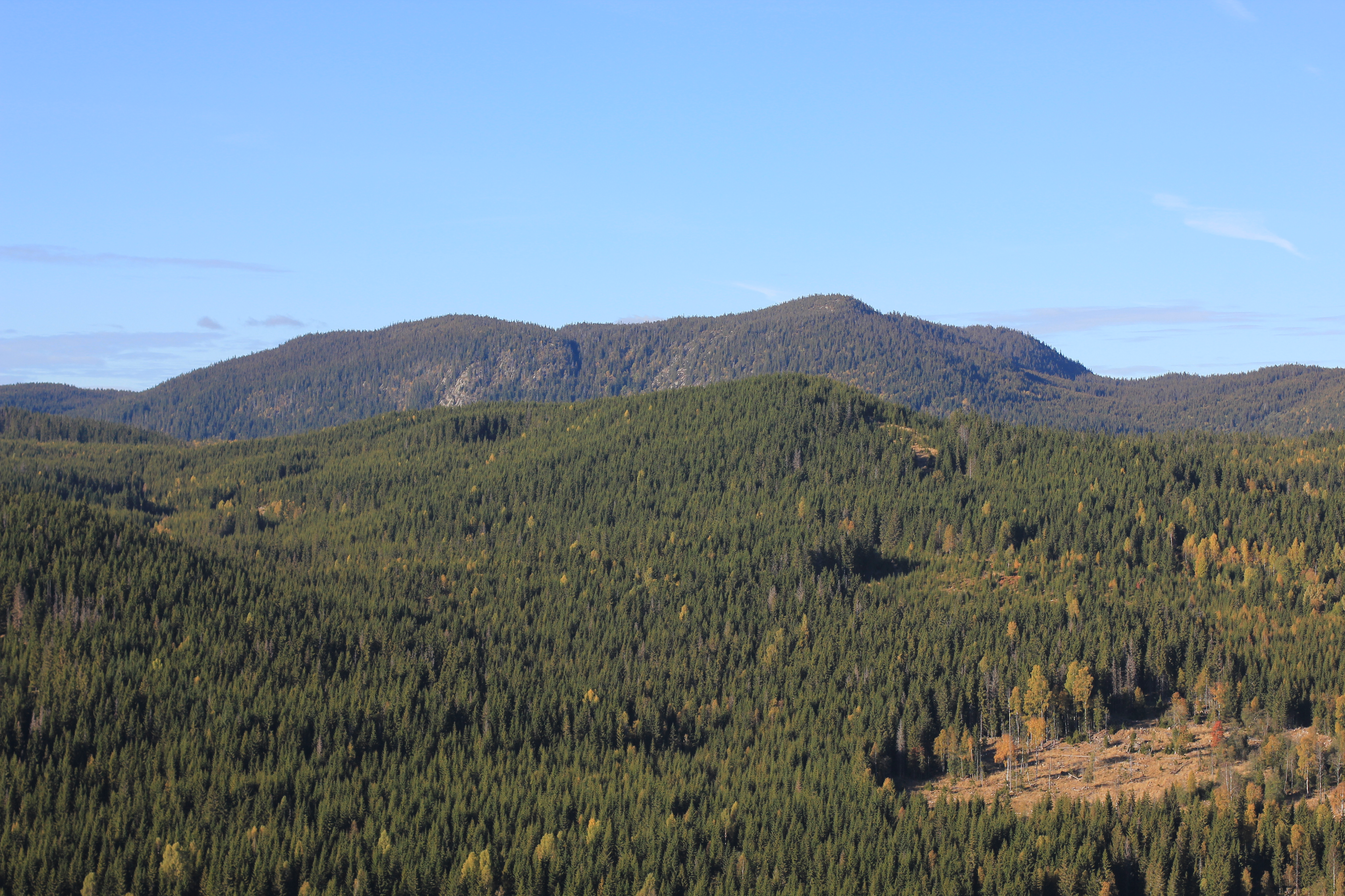 Fjellsjøkampen er Akershus høyeste topp.